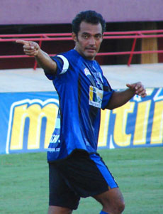 Juan García, jugador de AC Mineros de Guayana